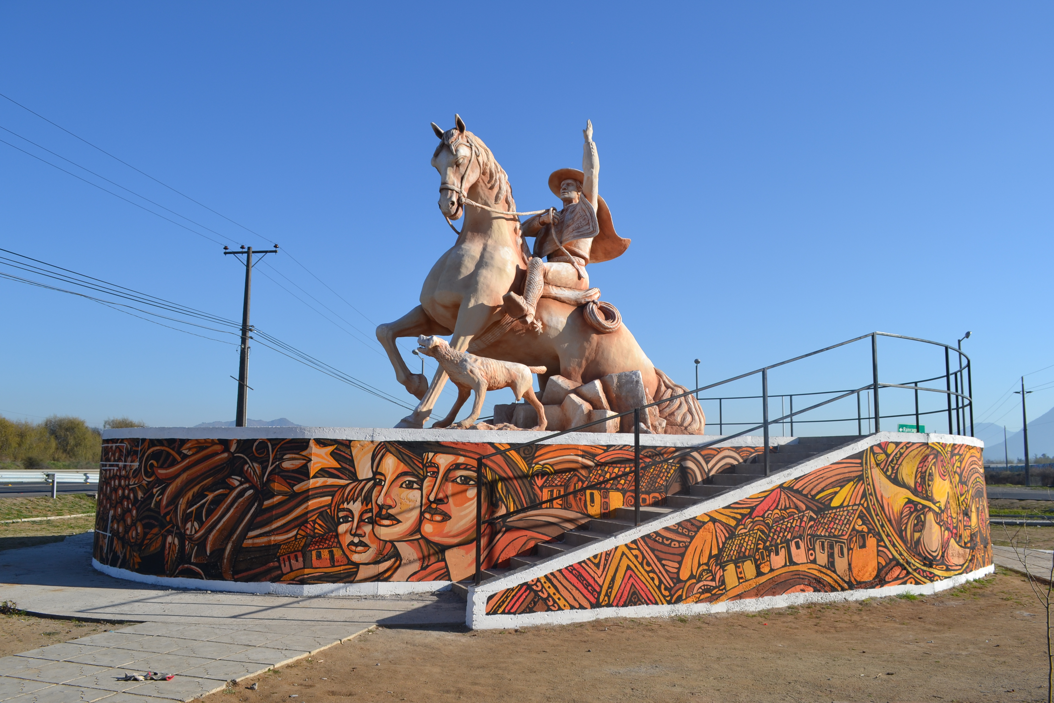 Monumento de acceso a la comuna de Doñihue, ubicado en la entrada al pueblo de Lo Miranda